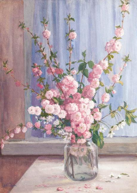 Фельдман В.А. «Сакура», 1920-е гг. бумага, акварель; 68,5х49.